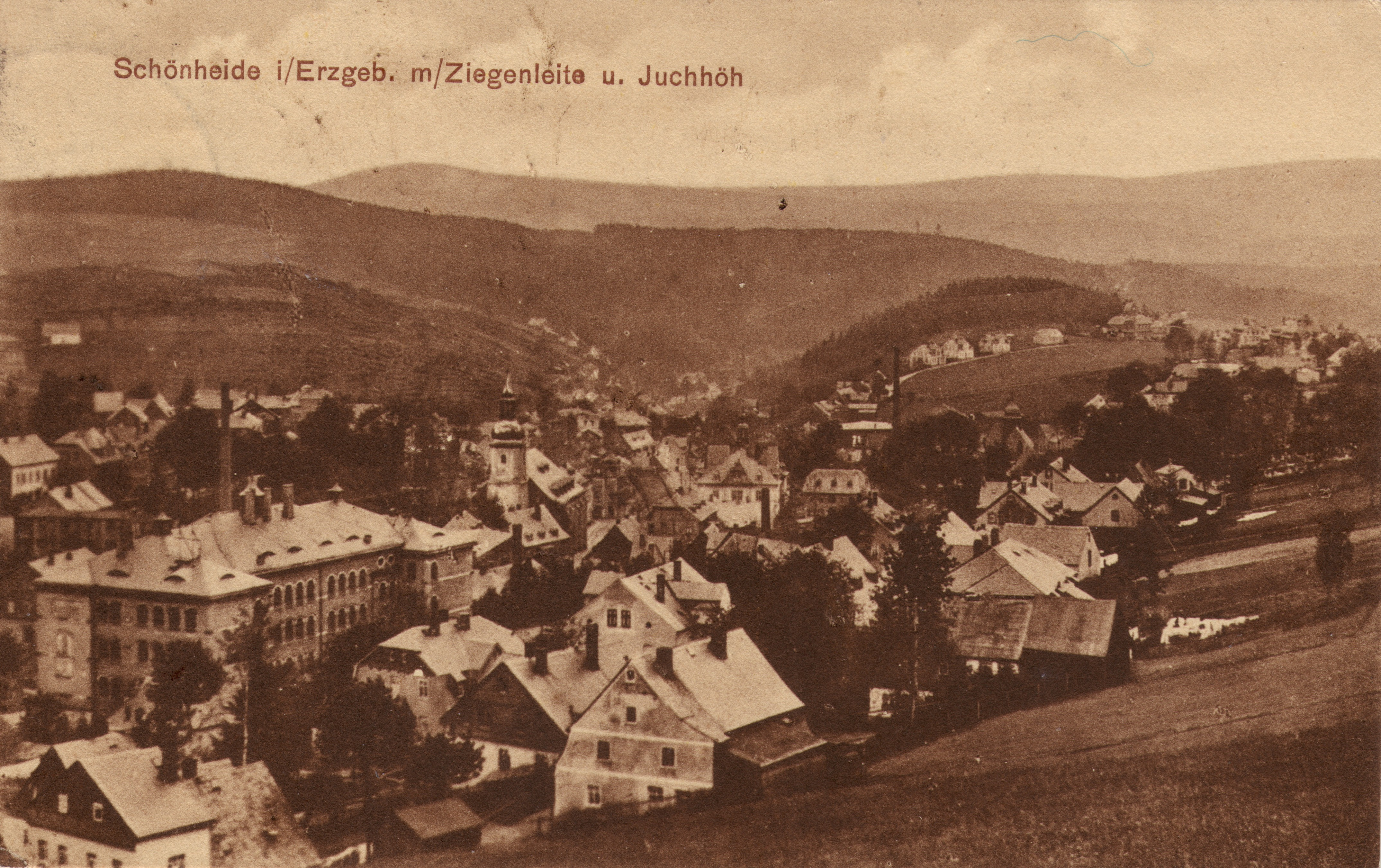 Schönheide im Erzgebirge: Ansichtskarte mit dem unteren Ortsteil. Besonders erwähnt werden auf der Karte die Ortsteile Buchhöhe (rechts davon die Hammerschule, Schule des Ortsteils Schönheiderhammer, mit ihrem Glockenturm) und Ziegenleithe. Im vorderen Bereich ist das große Gebäude der zwischen 1896 und 1898 errichteten Schule zu sehen (Geschwister-Scholl-Schule (Schönheide)).